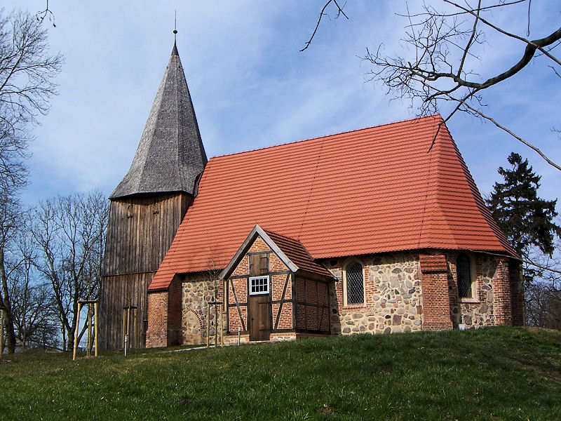 Kirche in Techentin, Landkreis Parchim